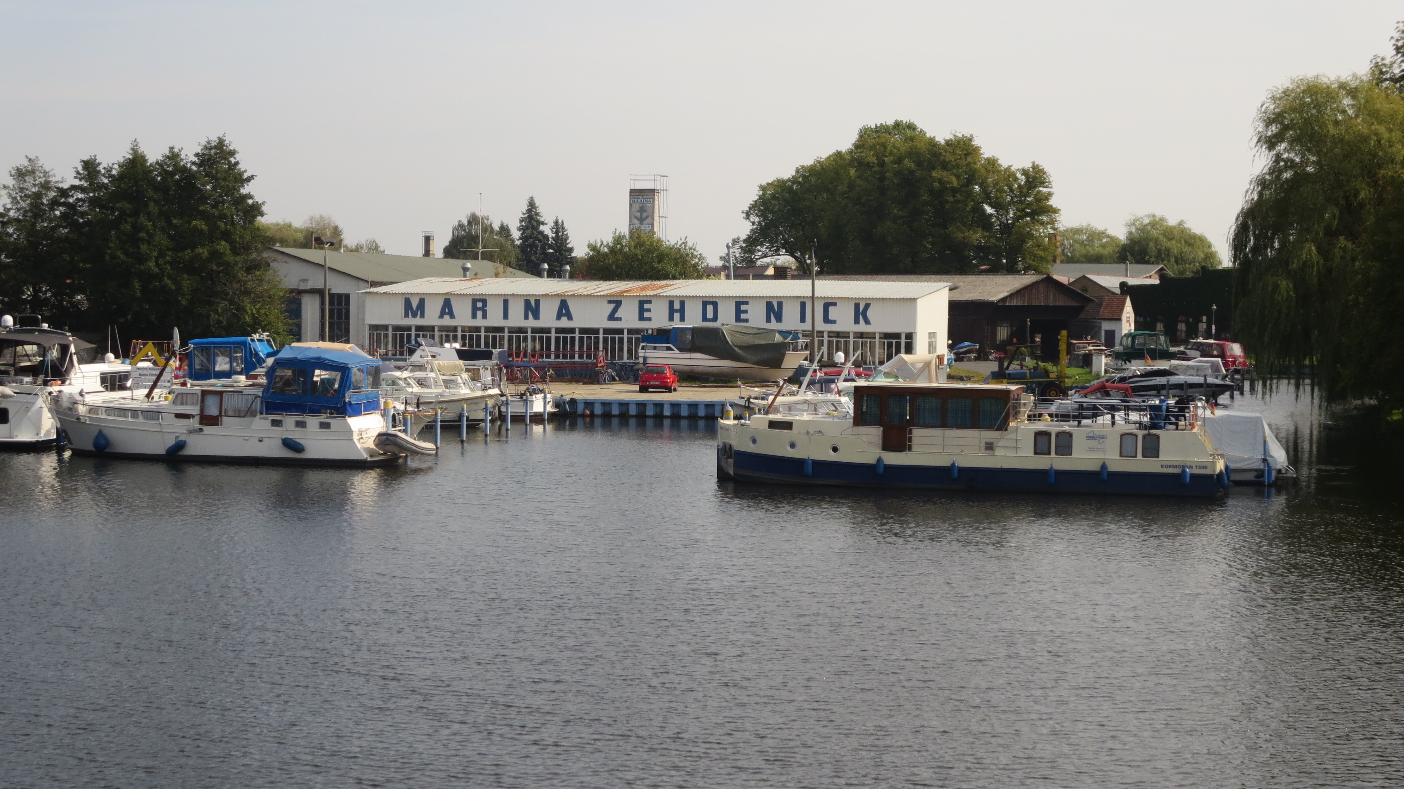 Zehdenick, Marina, Blick vom anderen Havelufer